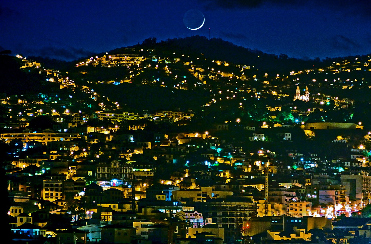 Nachtpanorama Funchal